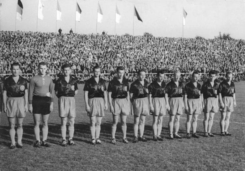 Zentralbild-Wen-Bey Bey-Noa 20.9.56 DDR-Fußball-Auswahl siegte 3:1. Am Donnerstag, den 20.9.1956, standen sich in einem Fußball-Länderspiel in Karl-Marx-Stadt vor 40 000 Zuschauern die Mannschaften von Indonesien und der DDR gegenüber. Die DDR-Auswahl siegte mit 3:1. UBz. Die DDR-Auswahl vor dem Länderspiel. Wir erkennen von links nach rechts: Schoen, Marquardt, Tröger, Eilitz, Assmy, Schaller, Siegfried Wolf, Kaiser, Schröter, Wirth, Karl Wolf.